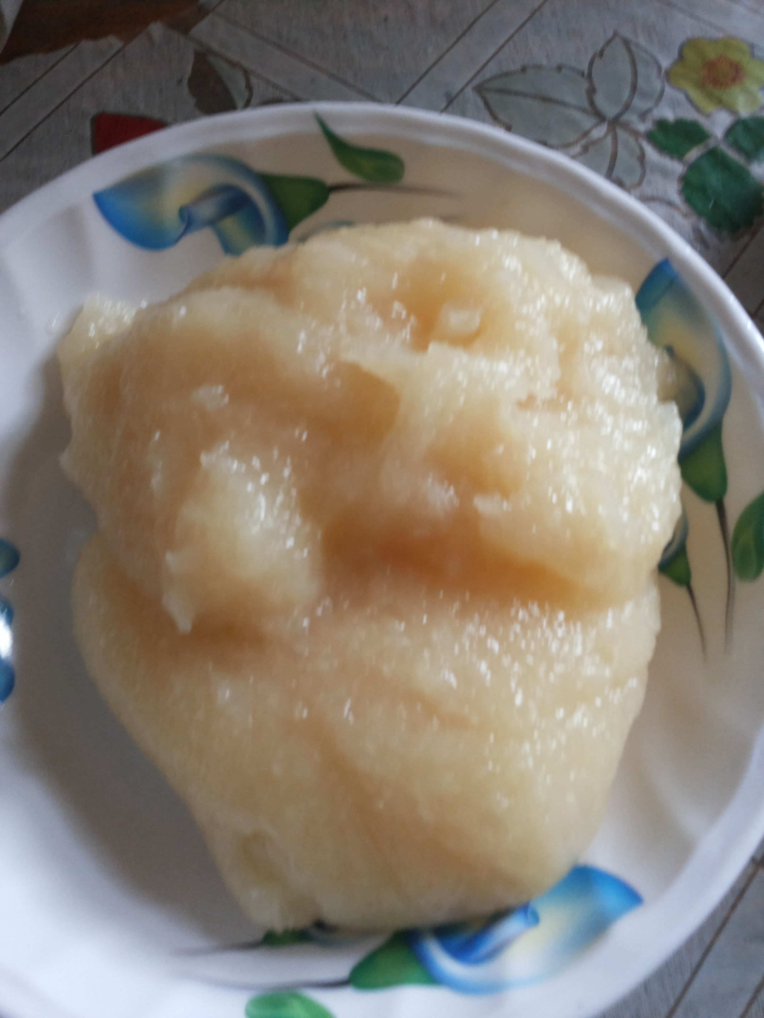 Placali servi dans une assiette